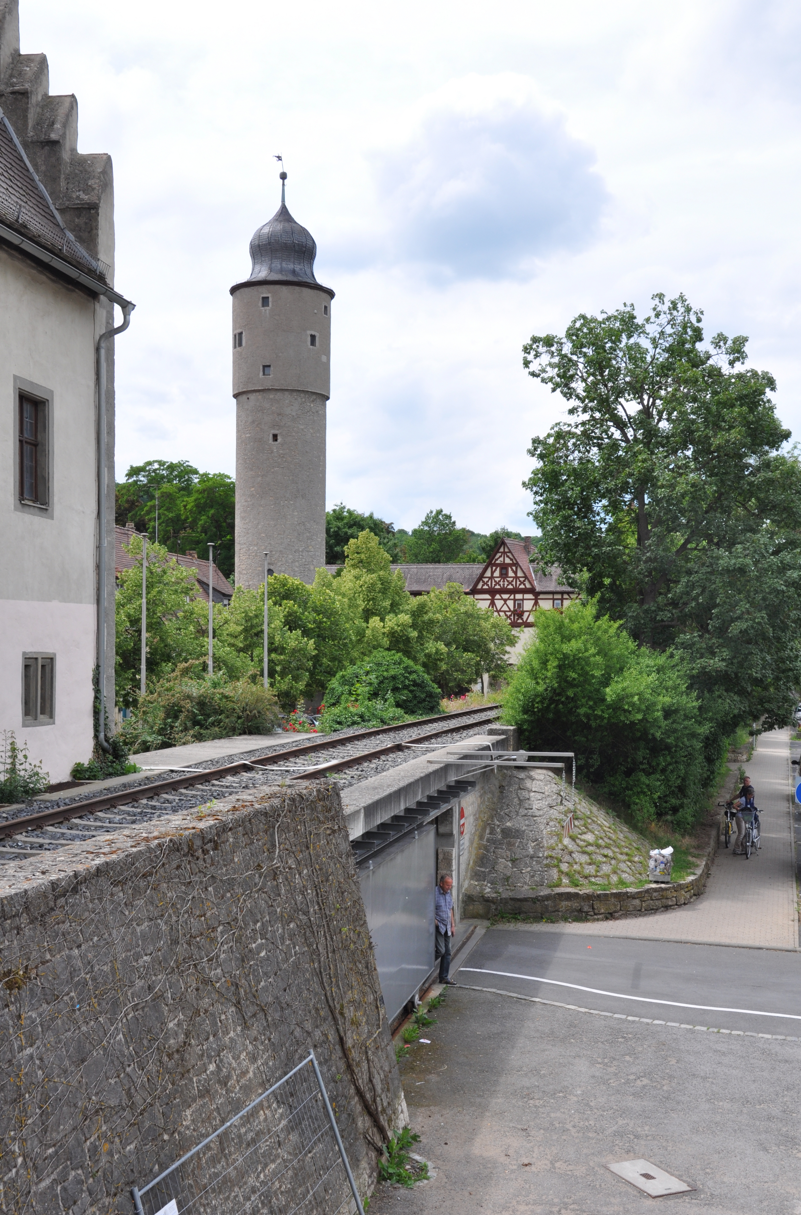 Ochsenfurt, Blick zum Taubenturm